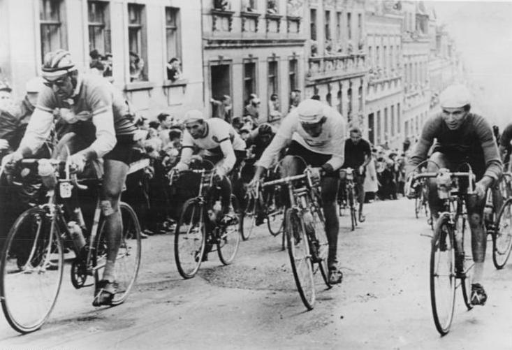 Friedensfahrt, Chemnitz, Stadtdurchfahrt Zentralbild Wendorf 12.5.1961 XIV. Internationale Friedensfahrt Warschau–Berlin–Prag 1961. 9.Etappe von Leipzig über Halle nach Karl-Marx-Stadt am 11.5.1961. UBz: Die steile Wand von Meerane verlangte den Aktiven alles ab. Die Fahrer nehmen die letzten Meter dieser Steigung. Ganz vorn der polnische Fahrer Andrzeij Piechaczek.